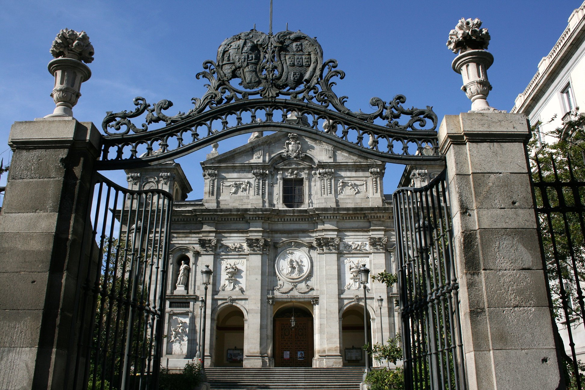 Iglesia del convento de las Salesas Reales, Madrid, 1750-1758.